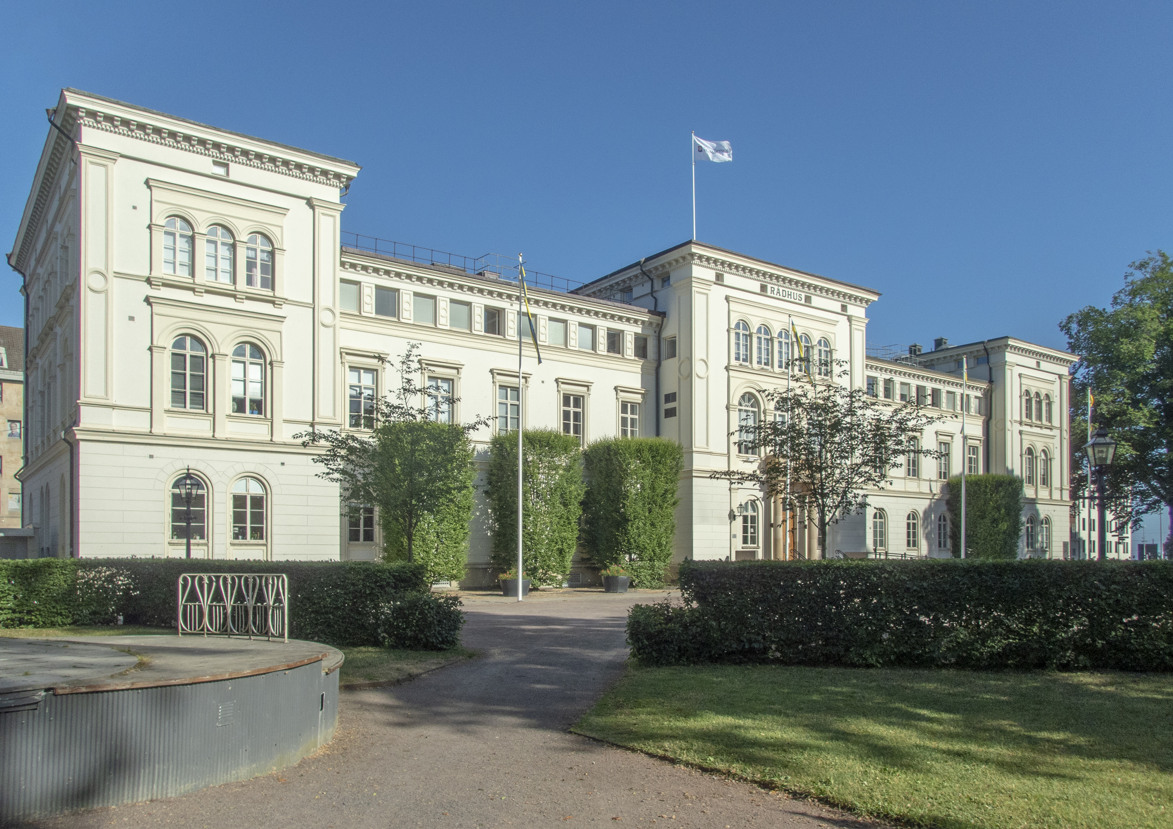 Jönköpings rådhus, ritat av Fridolf Wijnbladh i nyrenässans och uppfördes 1864–67. Den användes ursprungligen som Jönköpings högre allmänna läroverk